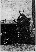 Šachista Serafino Dubois